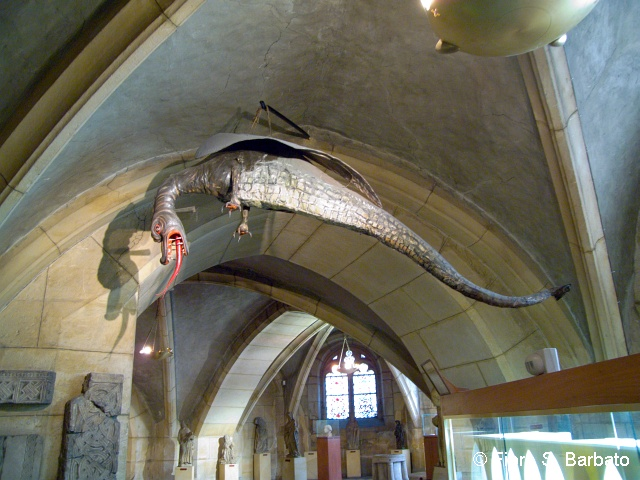 La statua del leggendario drago Graoully. Wikipedia: Metz ; Lorena .